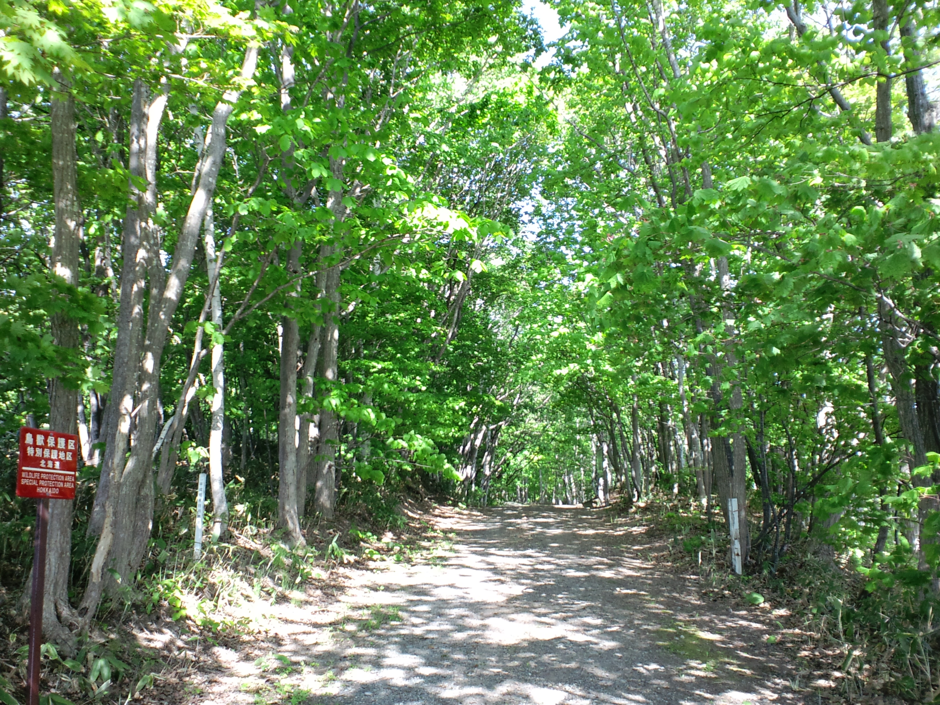 利根別自然公園・利根別自然休養林の入口